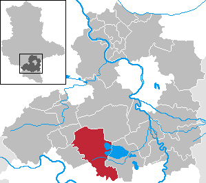 Mücheln (Geiseltal) in Saxony-Anhalt - Saalekreis